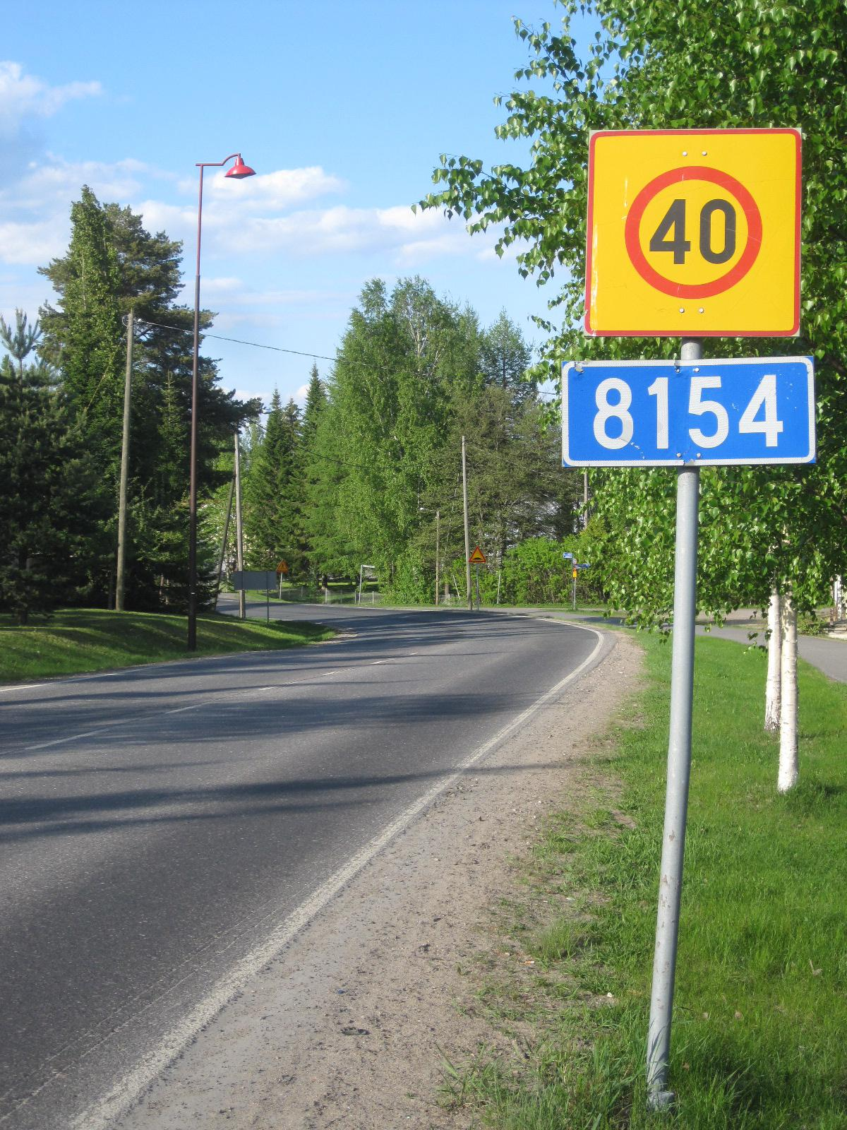 Piriläntie (Yhdystie 8154) Oulun suuntaan katsottuna.